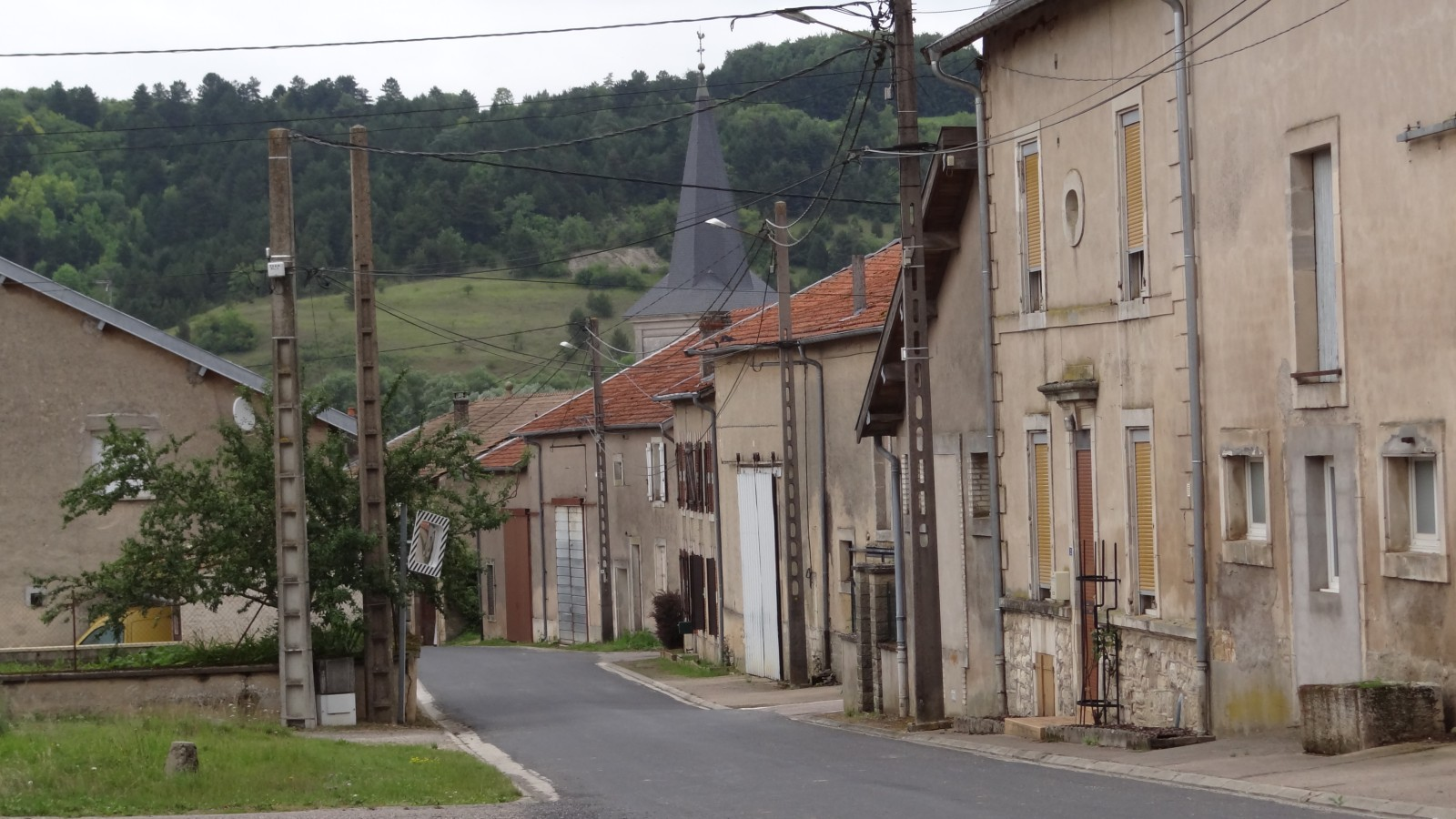 Han-sur-Meuse (55) Rue du Milieu